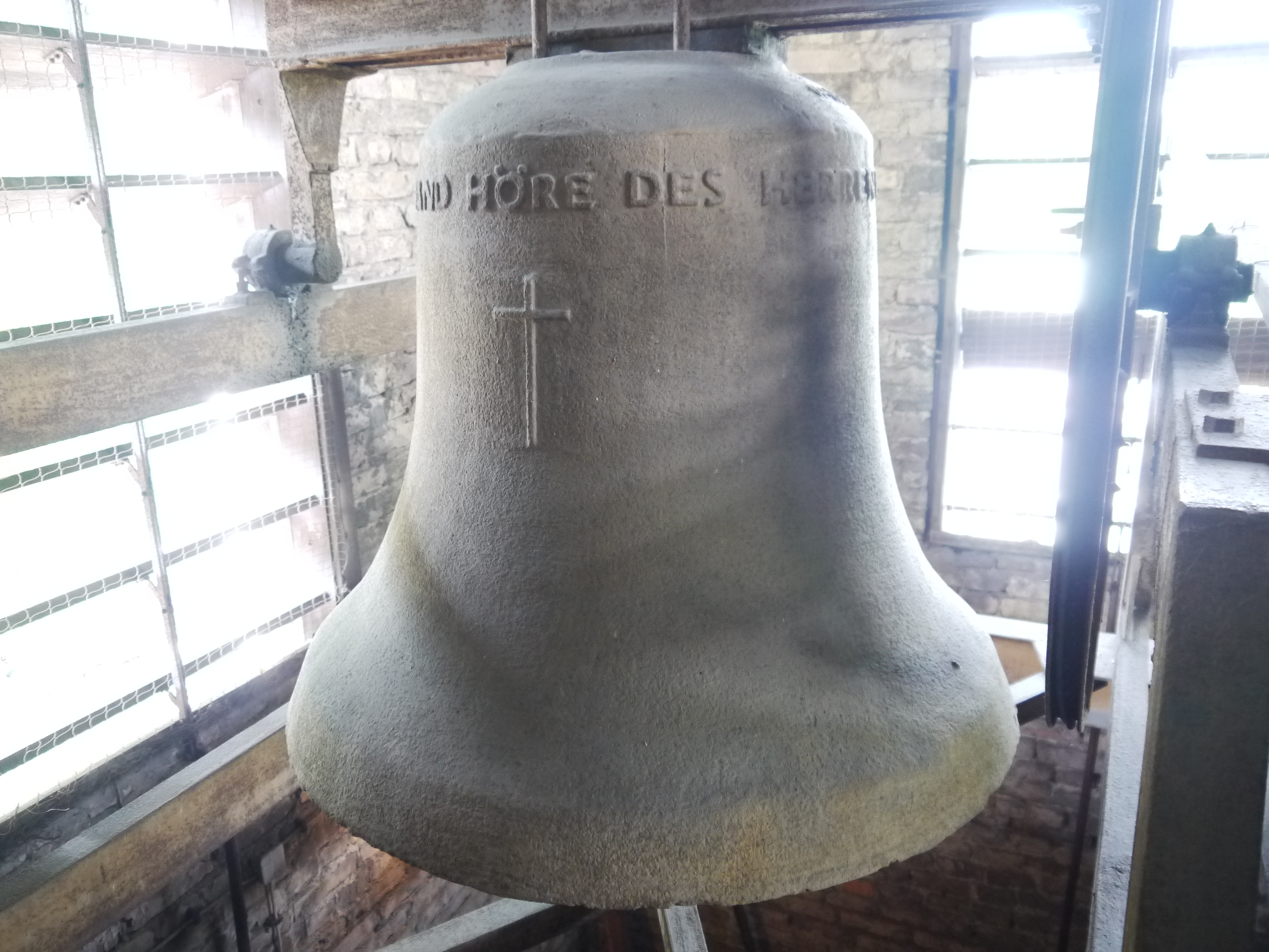 Die große Glocke der Pfarrkirche (Berlin-Weißensee)